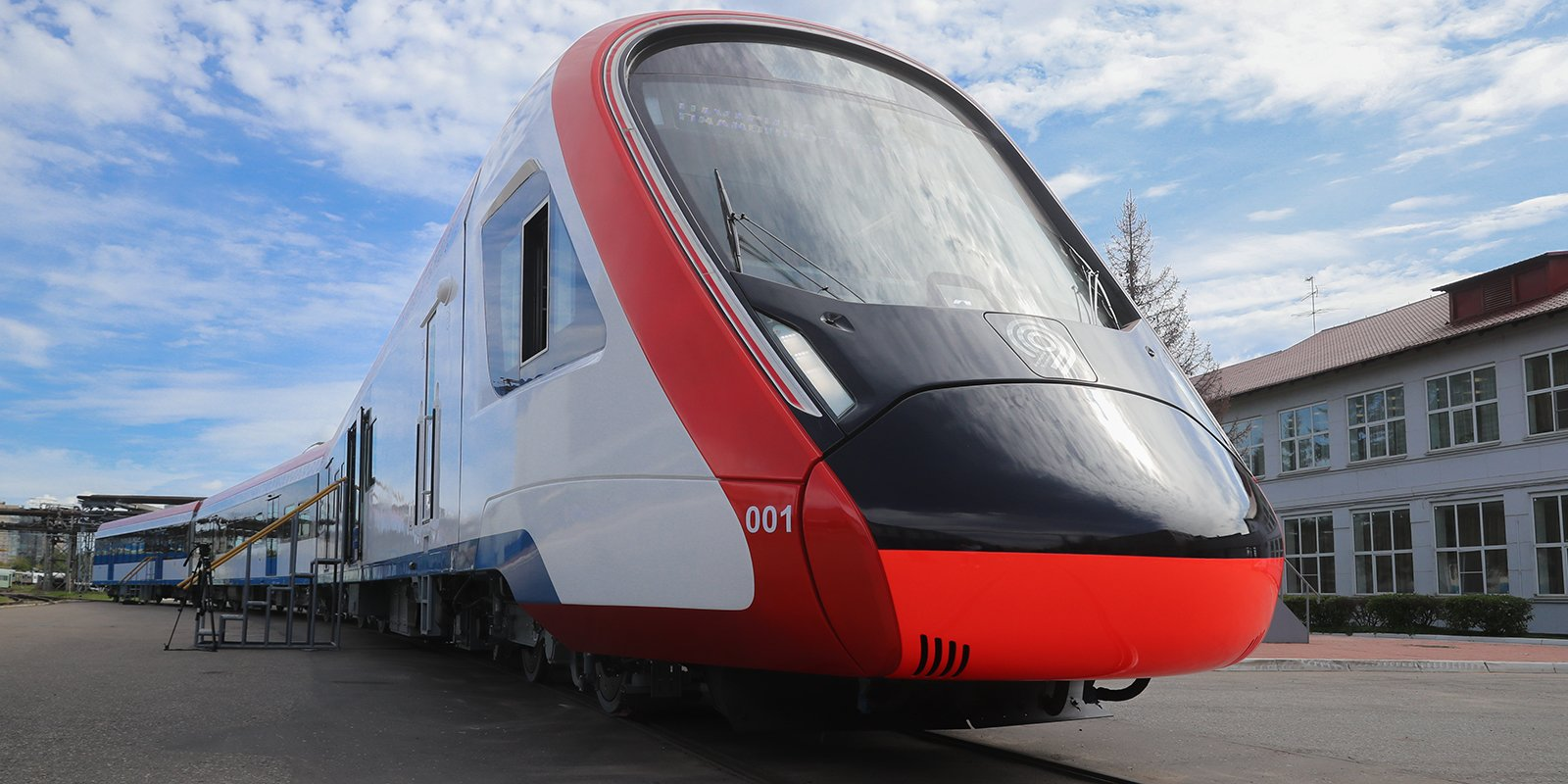 Трёхвагонная секция электропоезда ЭГ2Тв-027 «Иволга» на Тверском вагоностроительном заводе